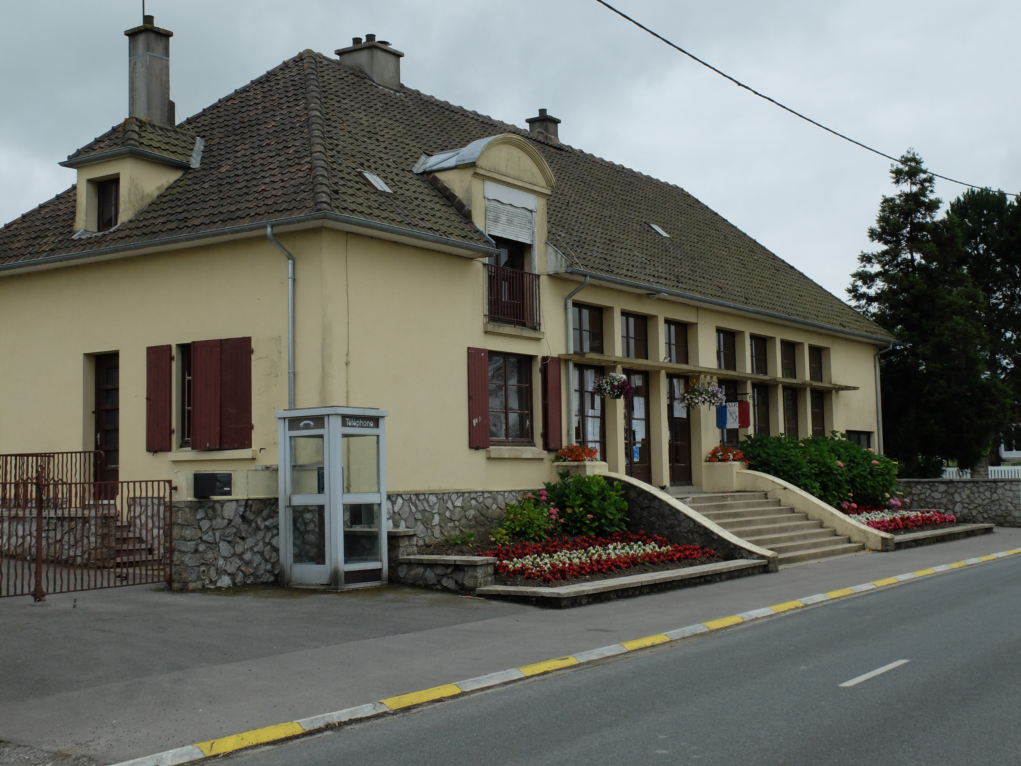 Vue de la mairie de Boursin (Pas-de-Calais).